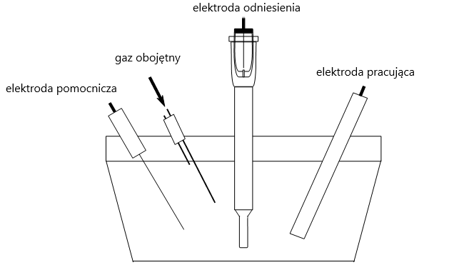 Schemat układu trójelektrodowego używanego w pomiarach woltamperometrycznych